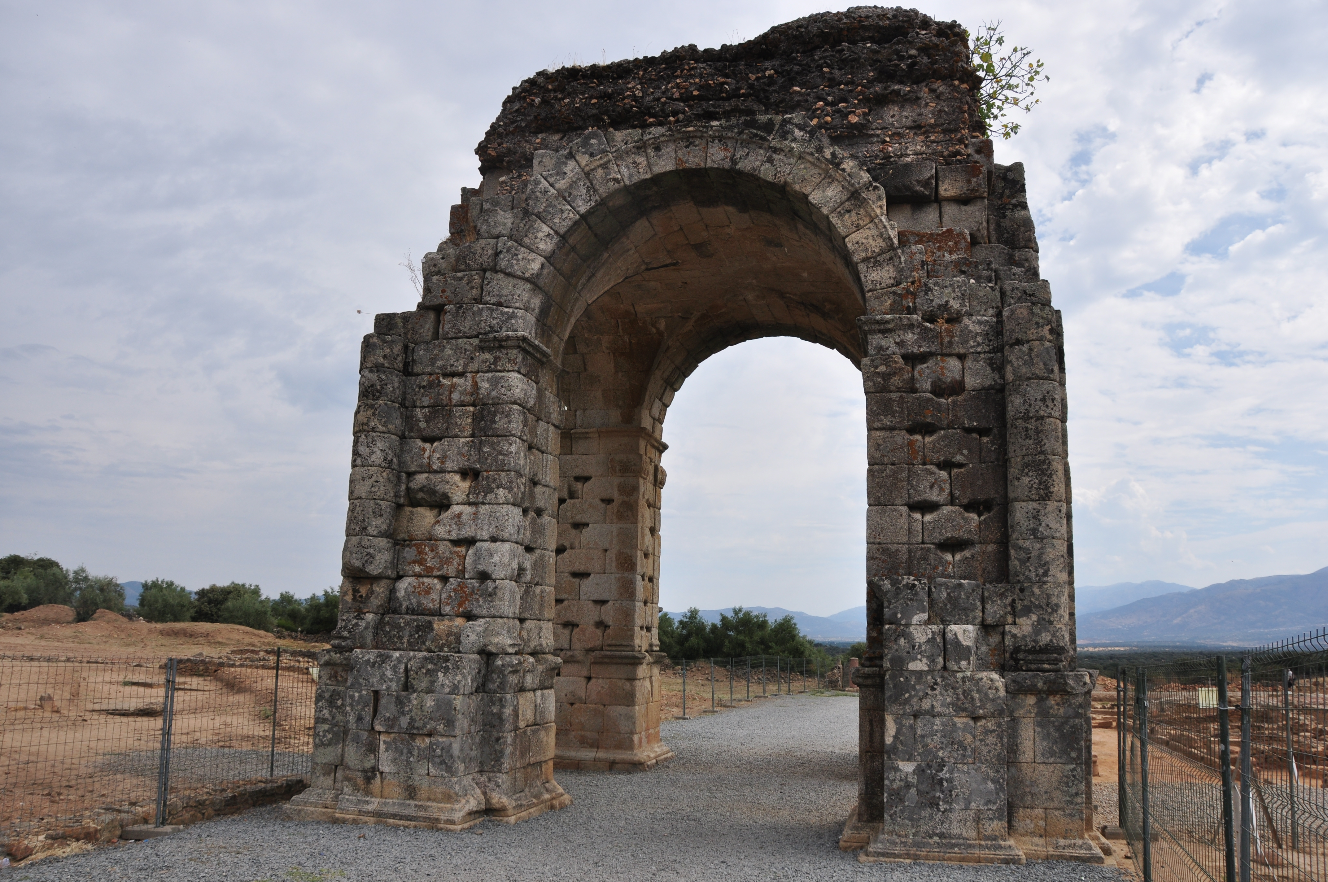 Arco de la ciudad romana de Càparra.